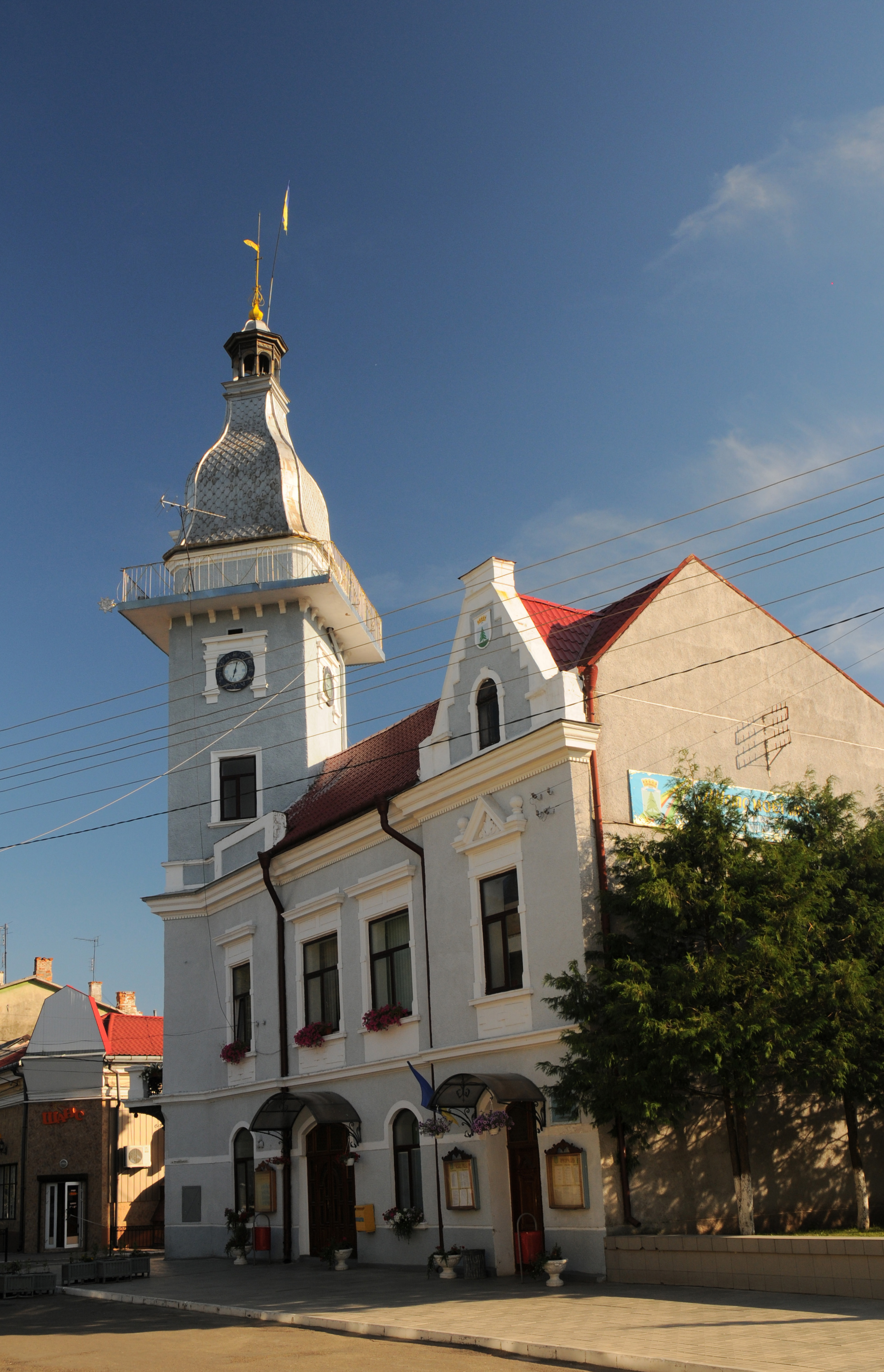 Primăria orașului Storojineț, regiunea Cernăuți, Ucraina